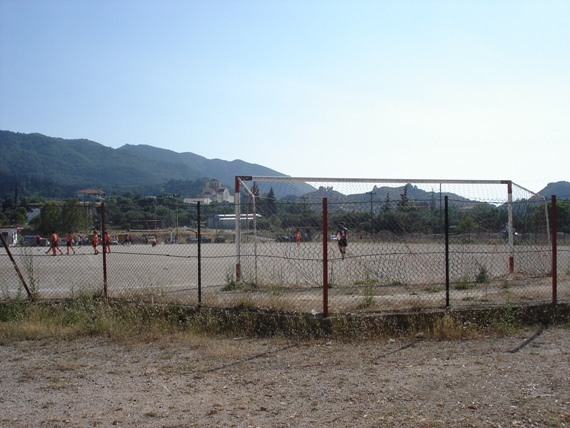 Drepano Groud Achaea GreeceΓήπεδο Δρεπάνου Αχαΐας